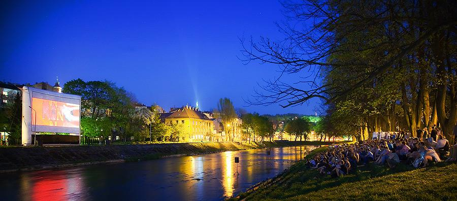 Festiwal Kino na Granicy Cieszyn 2012